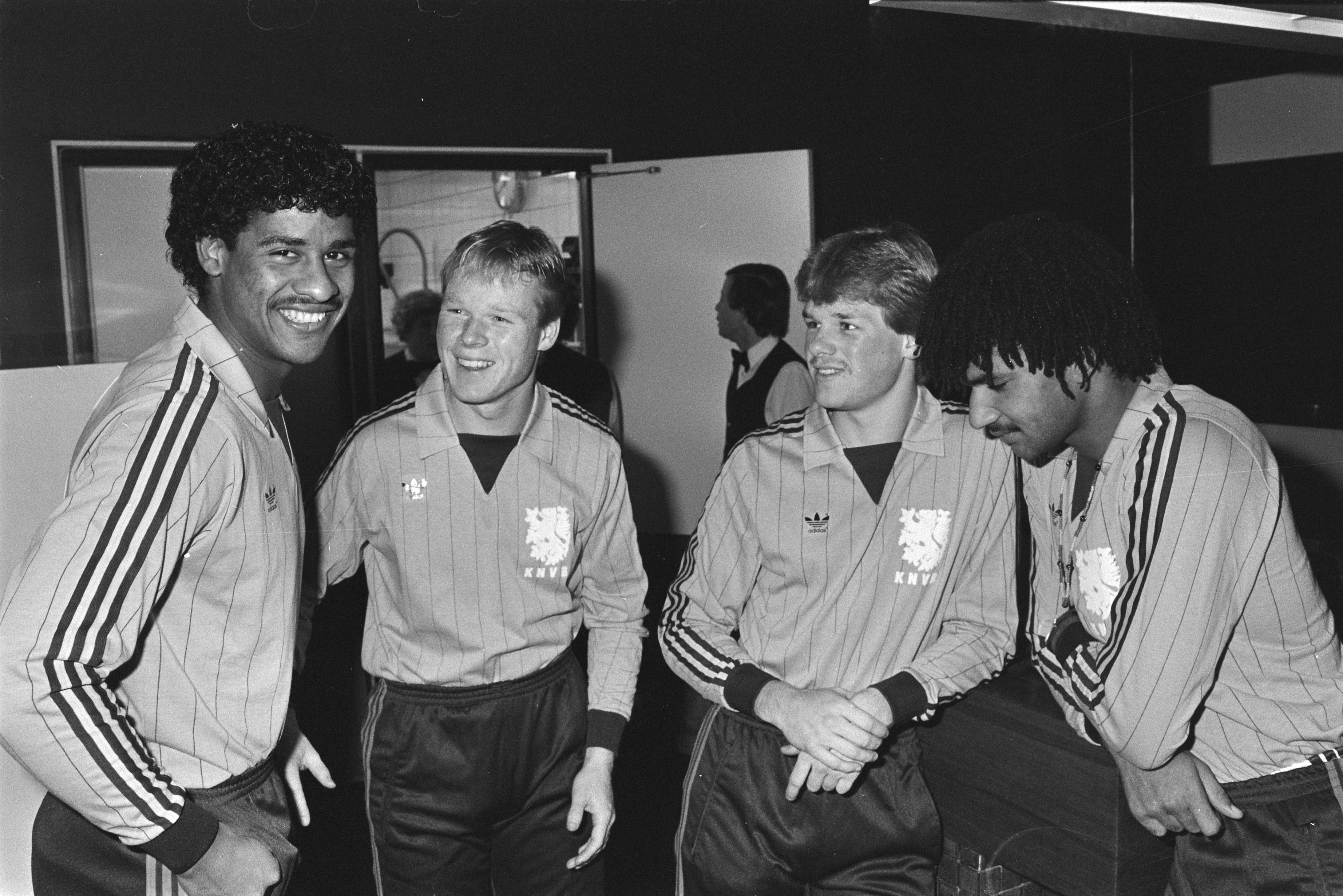 Collectie / Archief : Fotocollectie Anefo Reportage / Serie : [ onbekend ] Beschrijving : Zeist, training Nederlands elftal in verband met interland tegen Malta; v.l.n.r. Rijkaard, Ronald Koeman en Erwin Koeman Datum : 13 december 1983 Locatie : Utrecht, Zeist Trefwoorden : elftallen, sport, voetbal Persoonsnaam : Erwin Koeman, Koeman, Ronald, Rijkaard, Frank Fotograaf : Antonisse, Marcel / Anefo Auteursrechthebbende : Nationaal Archief Materiaalsoort : Negatief (zwart/wit) Nummer archiefinventaris : bekijk toegang 2.24.01.05 Bestanddeelnummer : 932-8072